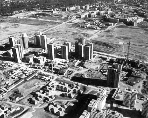 Prise de vue de la ZUP des Ulis (91) en chantier en 1977.